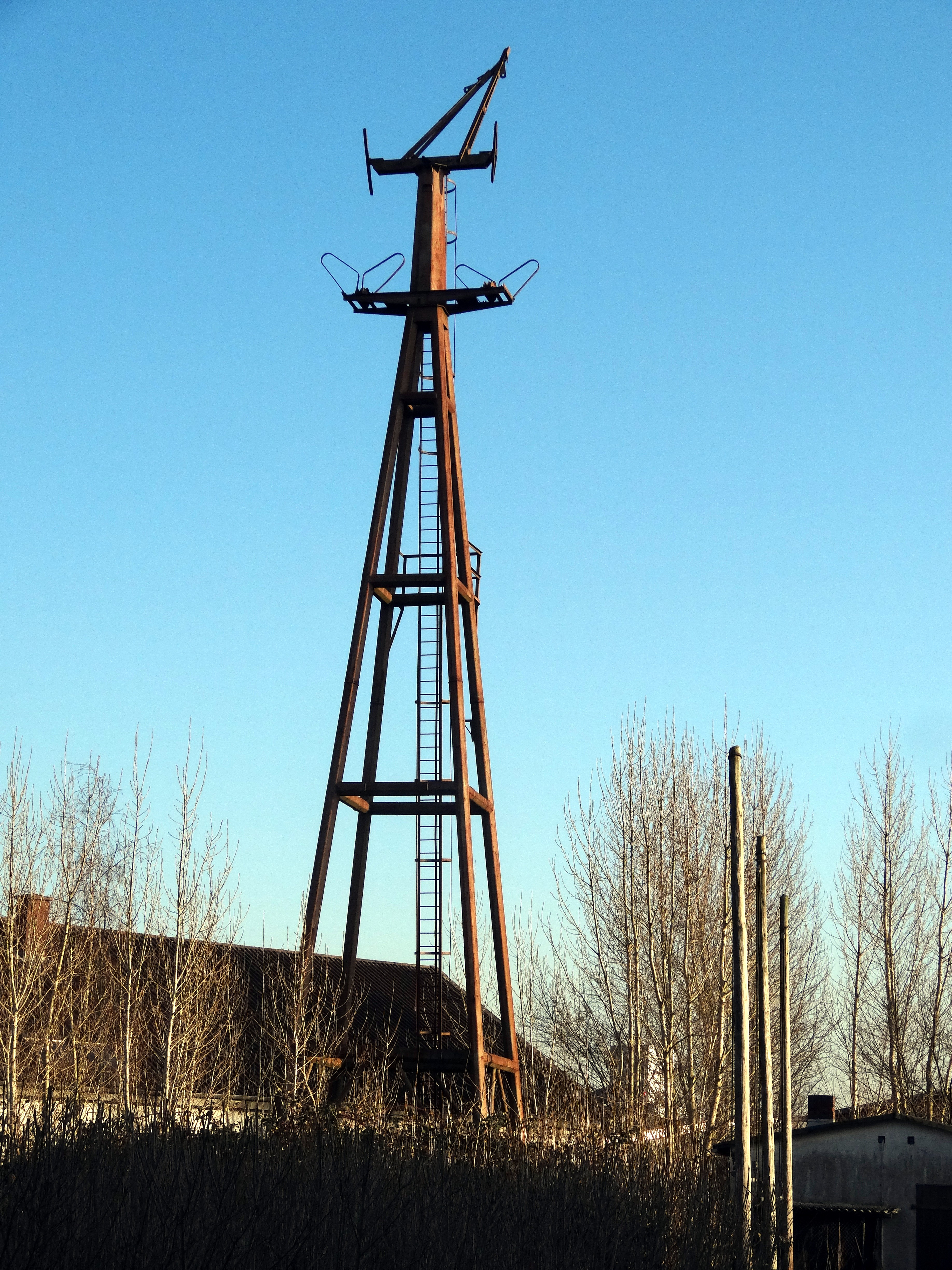 Letzter Mast der Agethorster Drahtseilbahn in Itzehoe